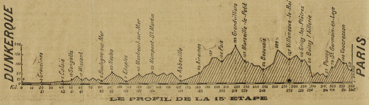 Tour de France 1919. Profil 15e étape